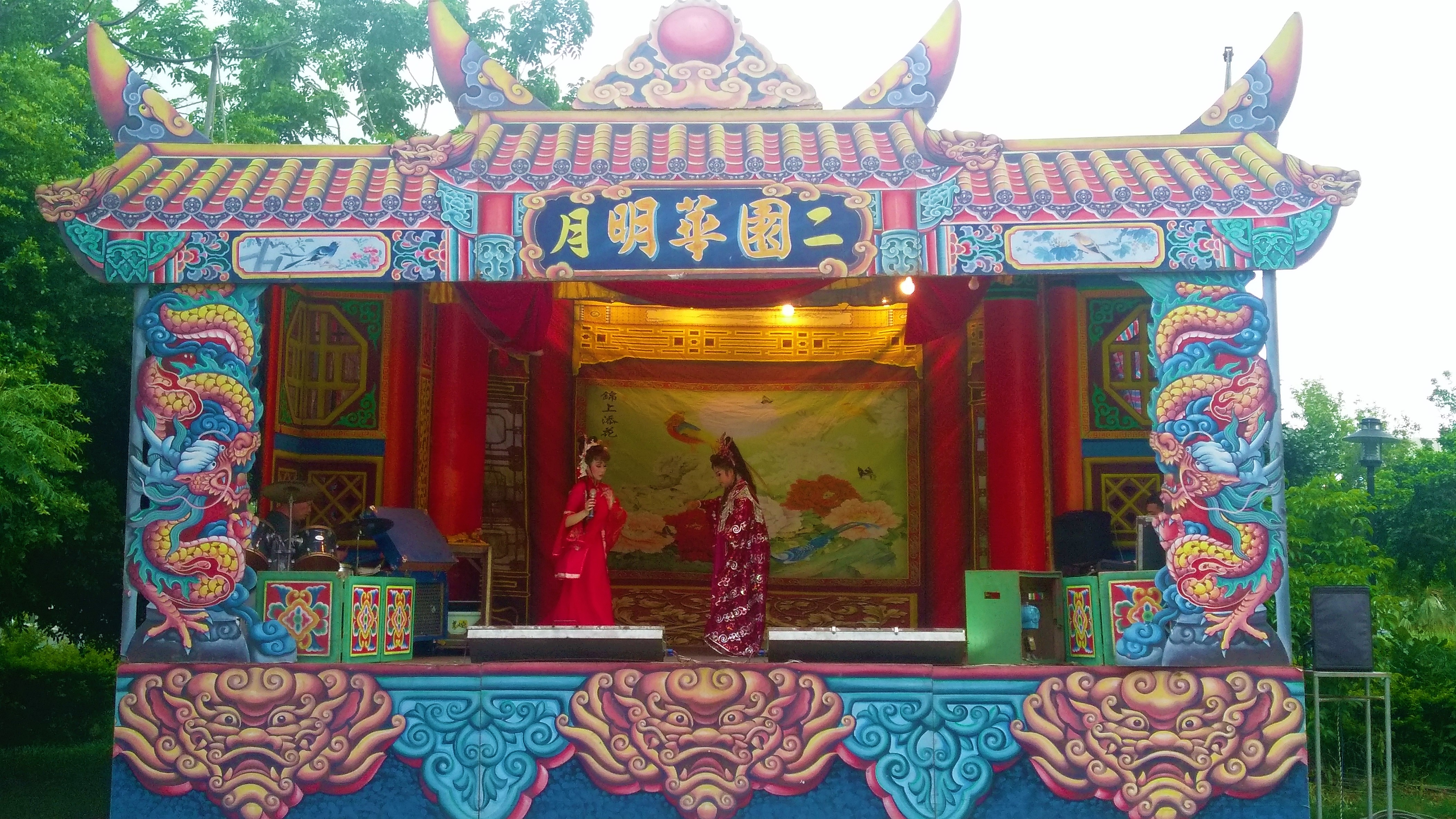 中文（台灣）: 明華園月二團演出